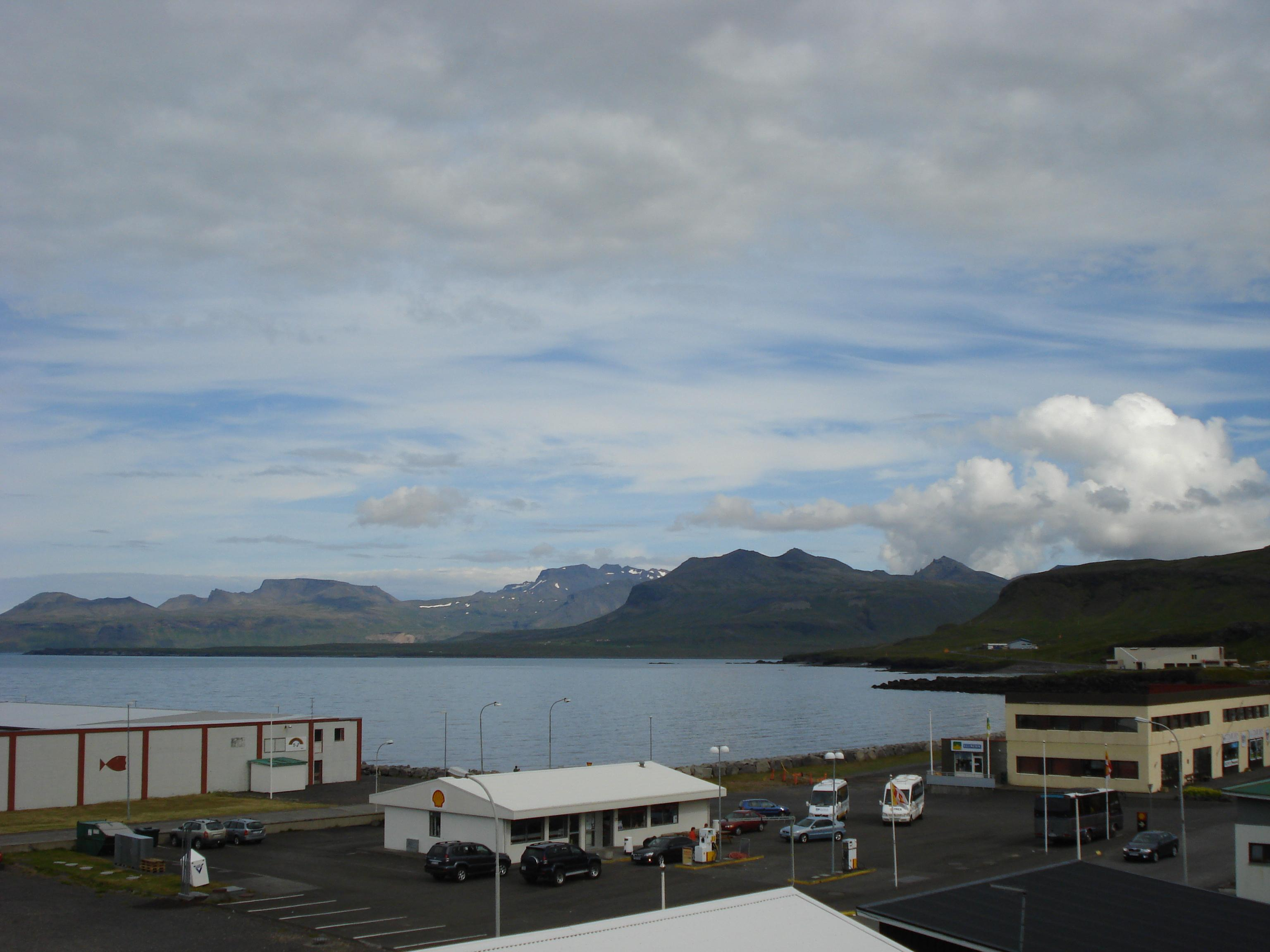 Ólafsvík